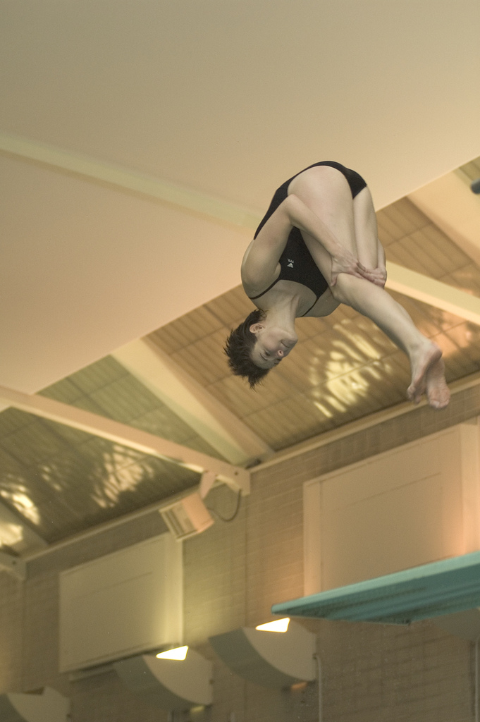 Diving -Abigail Penn (355)